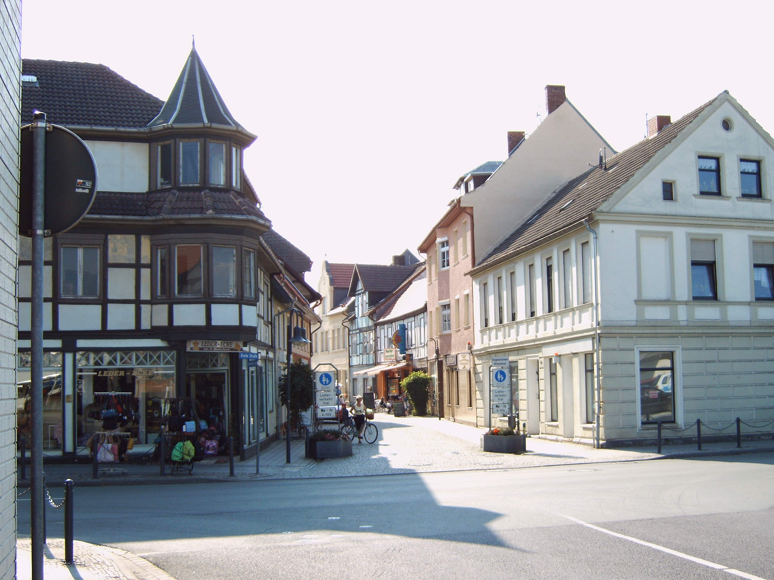 Eingang zur Fußgängerzone in Klötze